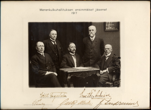 Merenkulkuhallituksen ensimmäiset jäsenet 1917.